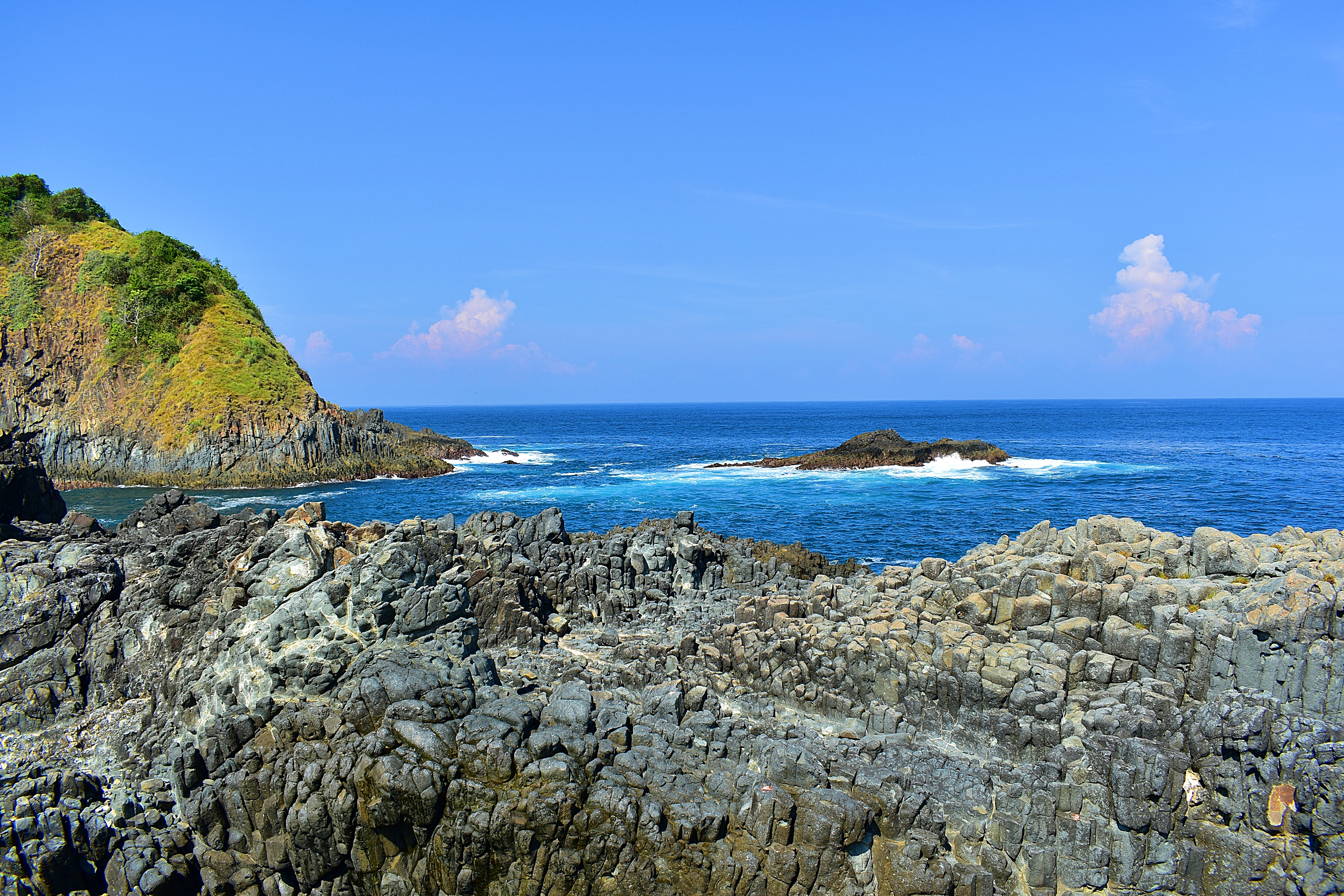 pantai semeti merupakan pantai yang tersembunyu tidak ada jalan untuk mobil kalaupun untuk motor berupa jalan setapak